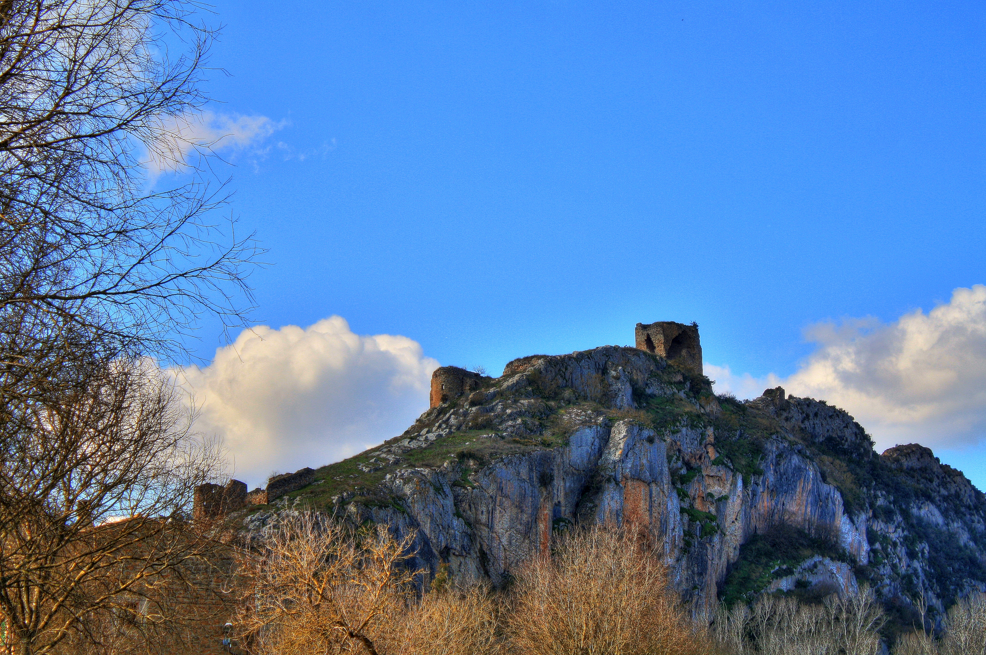 Castell de Rubió de Sols (Foradada)